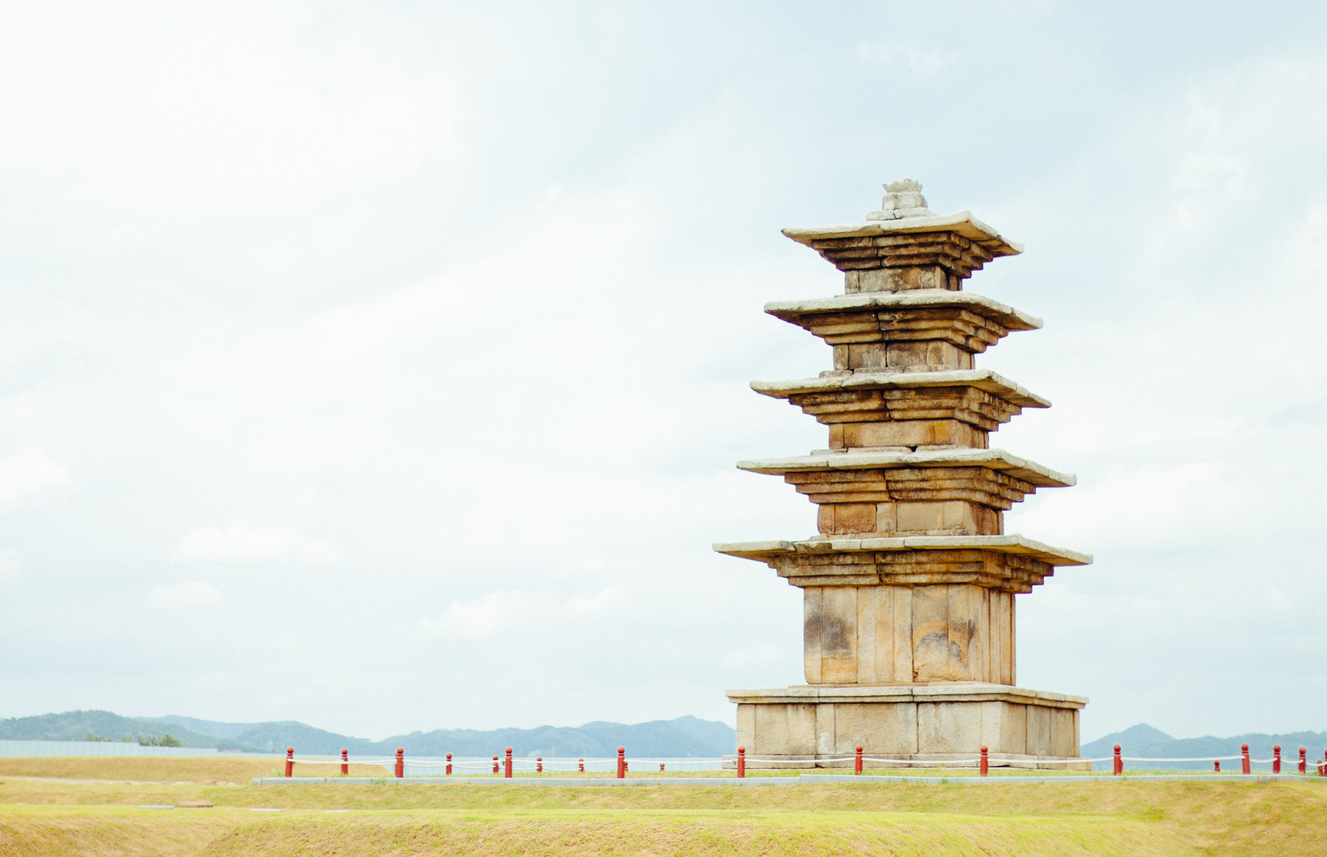 왕궁리 오층석탑